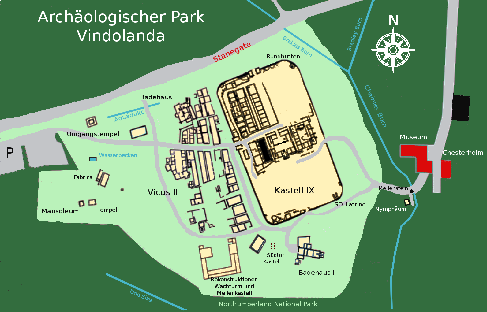 Übersichtsplan Archäologischer Park Vindolanda/Chesterholm.